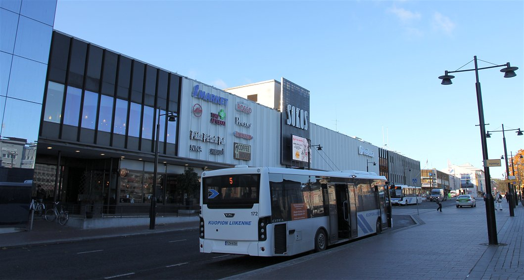 Kuopion Sokos -tavaratalo sijaitsee Kuopion keskustassa Kuopion torin länsilaidalla. Tavaratalon osoite on Haapaniemenkatu 24–26.